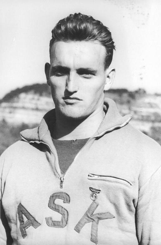 Fritz Kühl Zentralbild Wlocka-Wittig 20.07.1958 Deutsche Leichtathletikmeisterschaften vom 18.- 20.07.1958 in Jena. UBz: Deutscher Meister im Kugelstoßen wurde Fritz Kühl (ASK Vorwärts Berlin) .